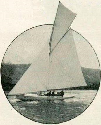 'Favorite' de Léon Susse, JO de 1900 (médaille d'argent 3 tonneaux).